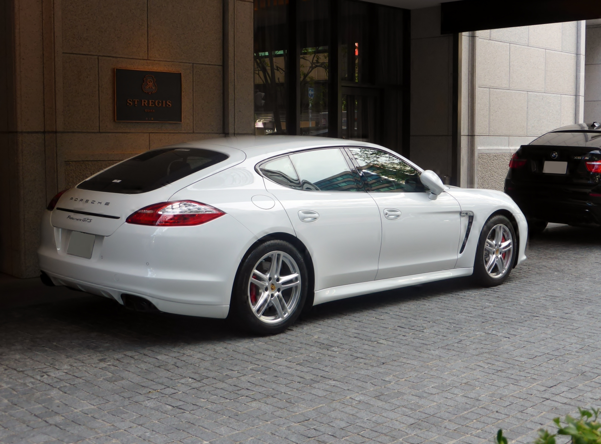 970型ポルシェ・パナメーラをリアから撮影。